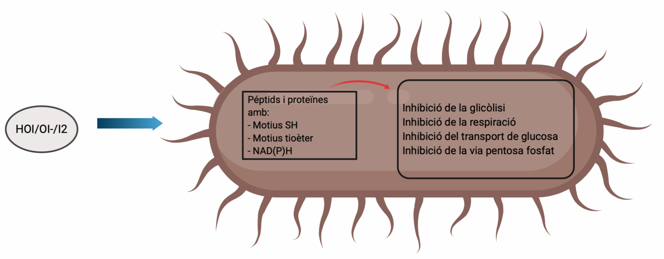 La oxidació de determinats grups de les proteïnes bacterianes per part dels tiocianats, desencadena tota una serie d'inhibicions amb efectes bactericides.